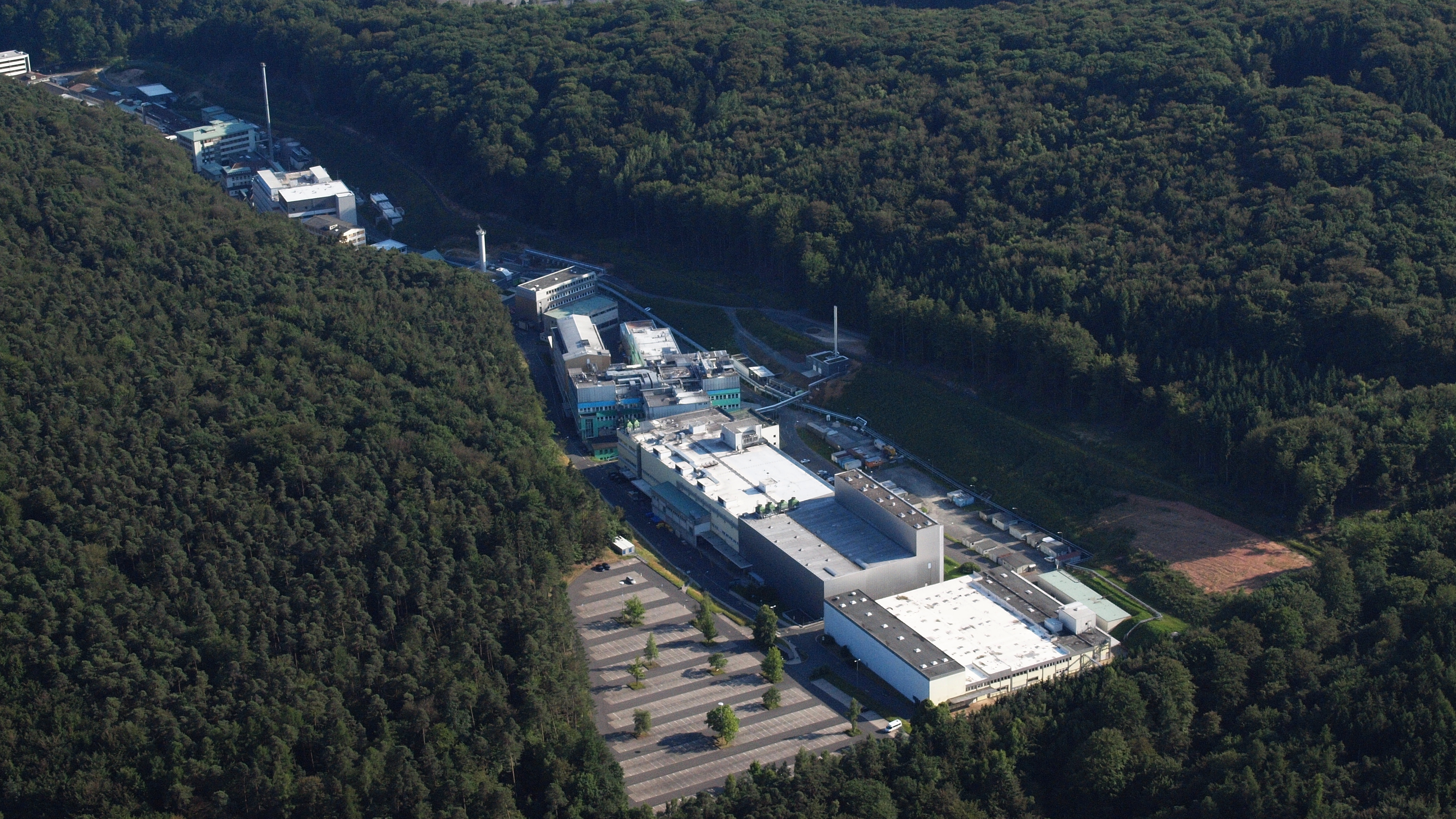 Marburg, Behringwerk Marbach: Luftaufnahme